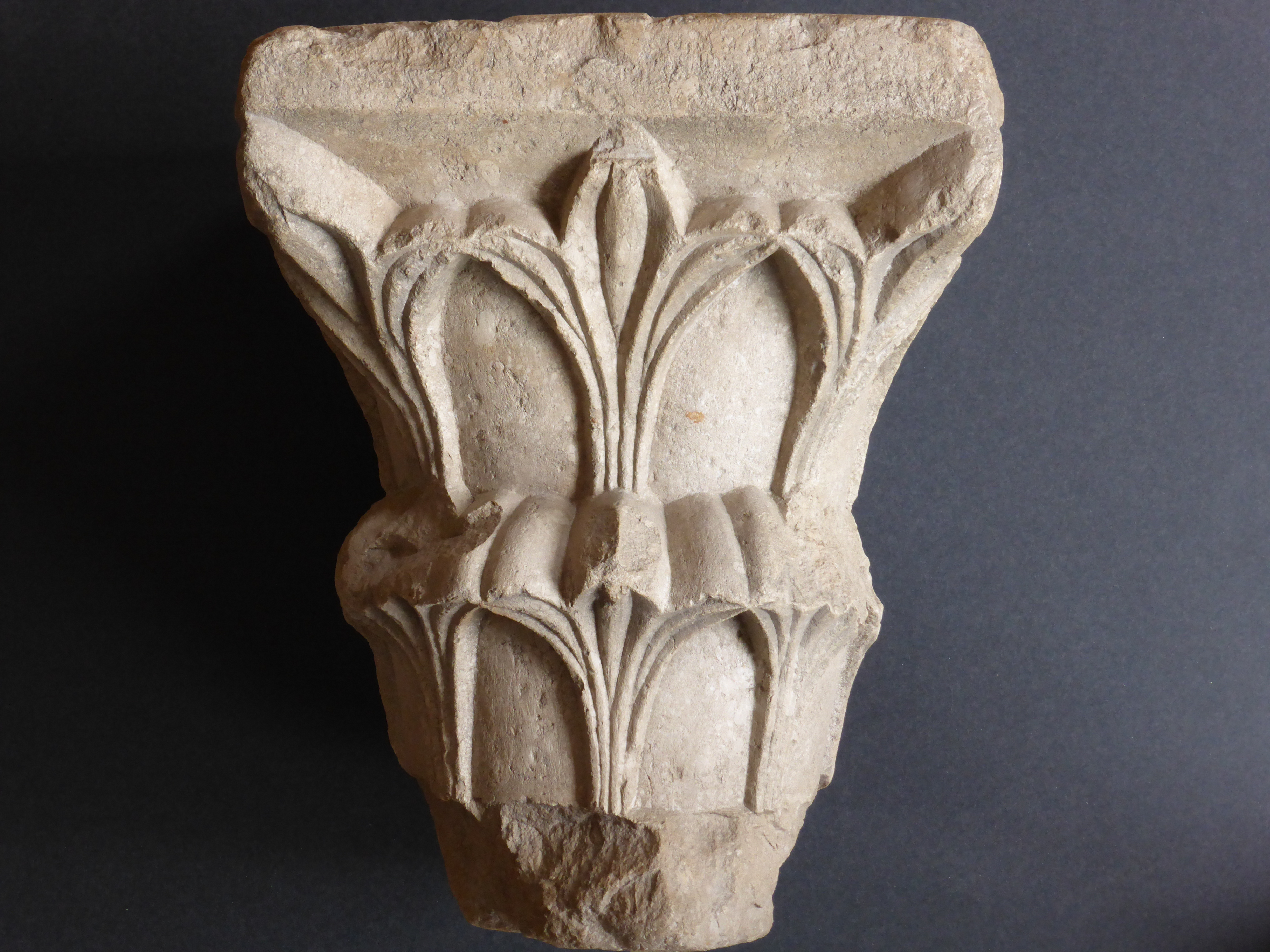 Capitel gótico, con motivos vegetales, de un antiguo inmueble del municipio de Gerona o Girona, al nordeste de España. Fue esculpido en la Edad Media, en la típica piedra gerundense, con fósiles de nummulites. Medidas de la pieza original: altura de 31,5 centímetros; anchura máxima 25,5 cm. Conservado en colección privada familiar, en el barrio o sitio de La Rodona (Girona). Debe proceder del claustro de una antigua iglesia desamortizada. Los nummulites son fósiles que parecen pequeñas monedas.